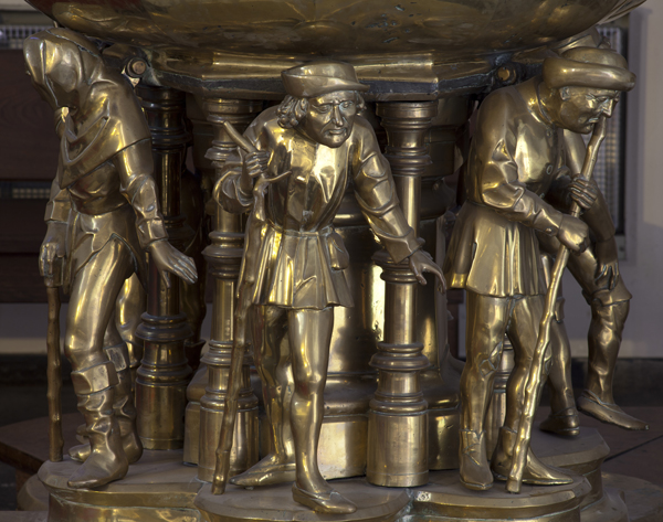 koperen doopvont uit 1492 door meester Aert uit Maastricht